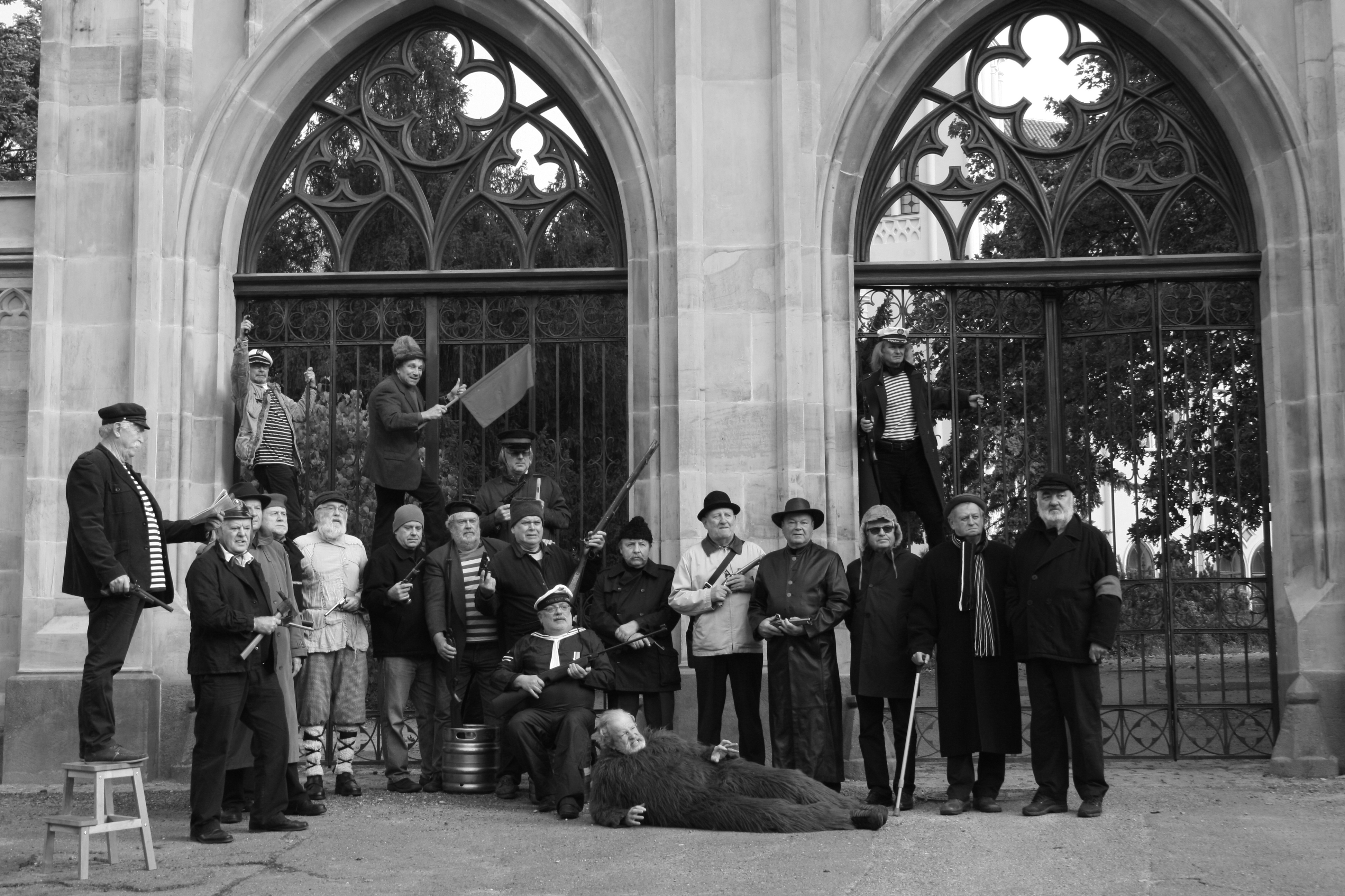 Praha, vchod do parku Stromovky, kde došlo k aranžování pro focení.